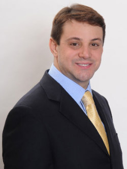 Gaspar Alberto Rivas Sánchez